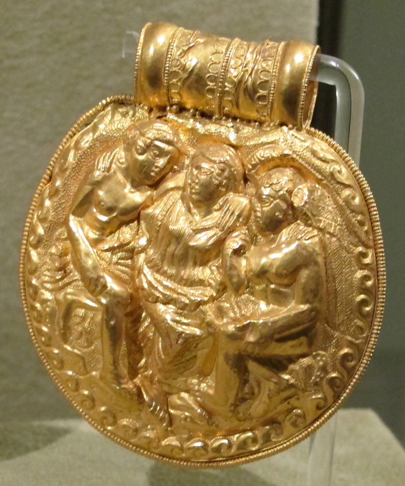 Museo Gregoriano Etrusco